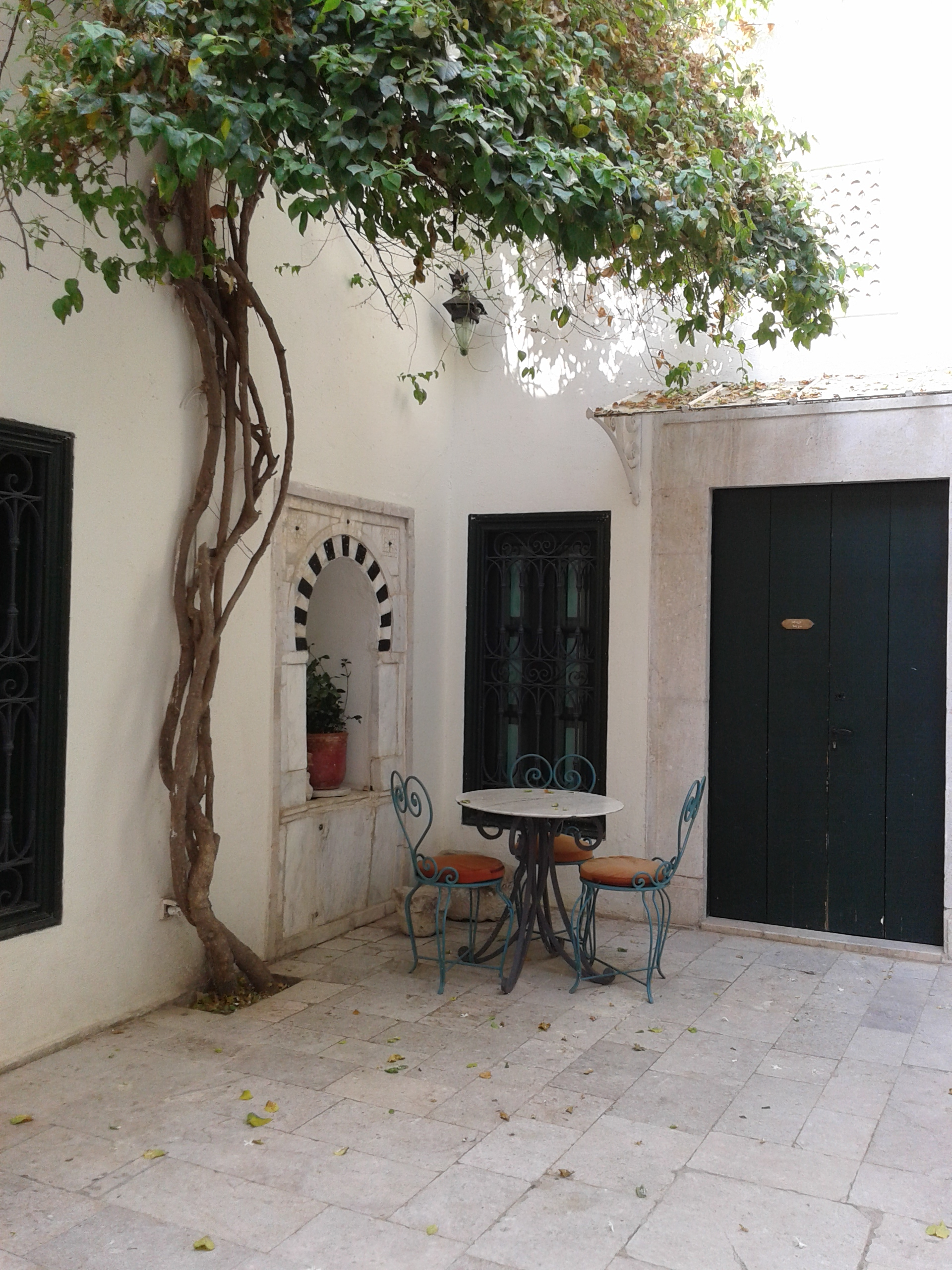 Hotel Dar el Medina ( Ex Dar balhouane)